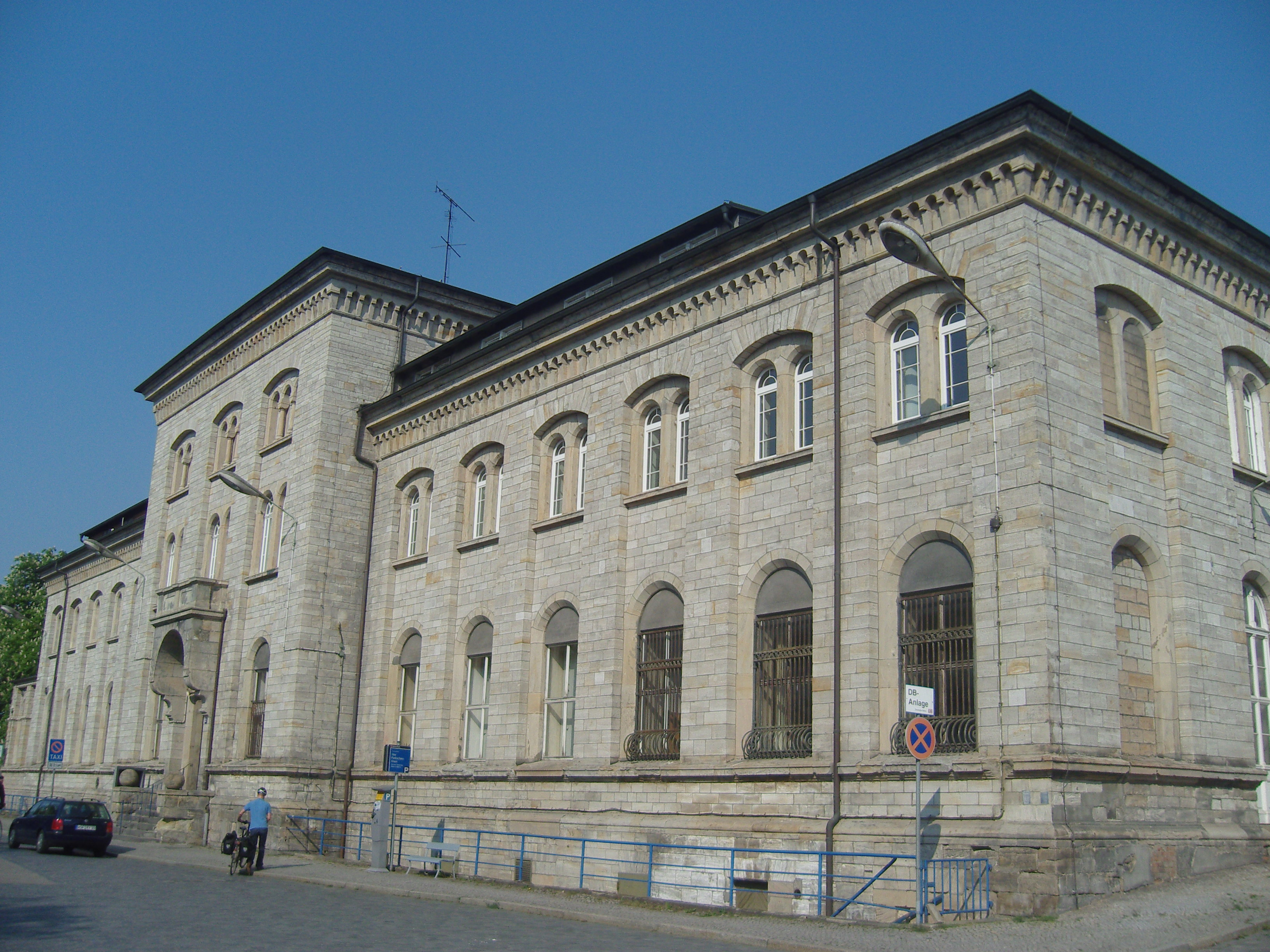 Bahnhof Weißenfels